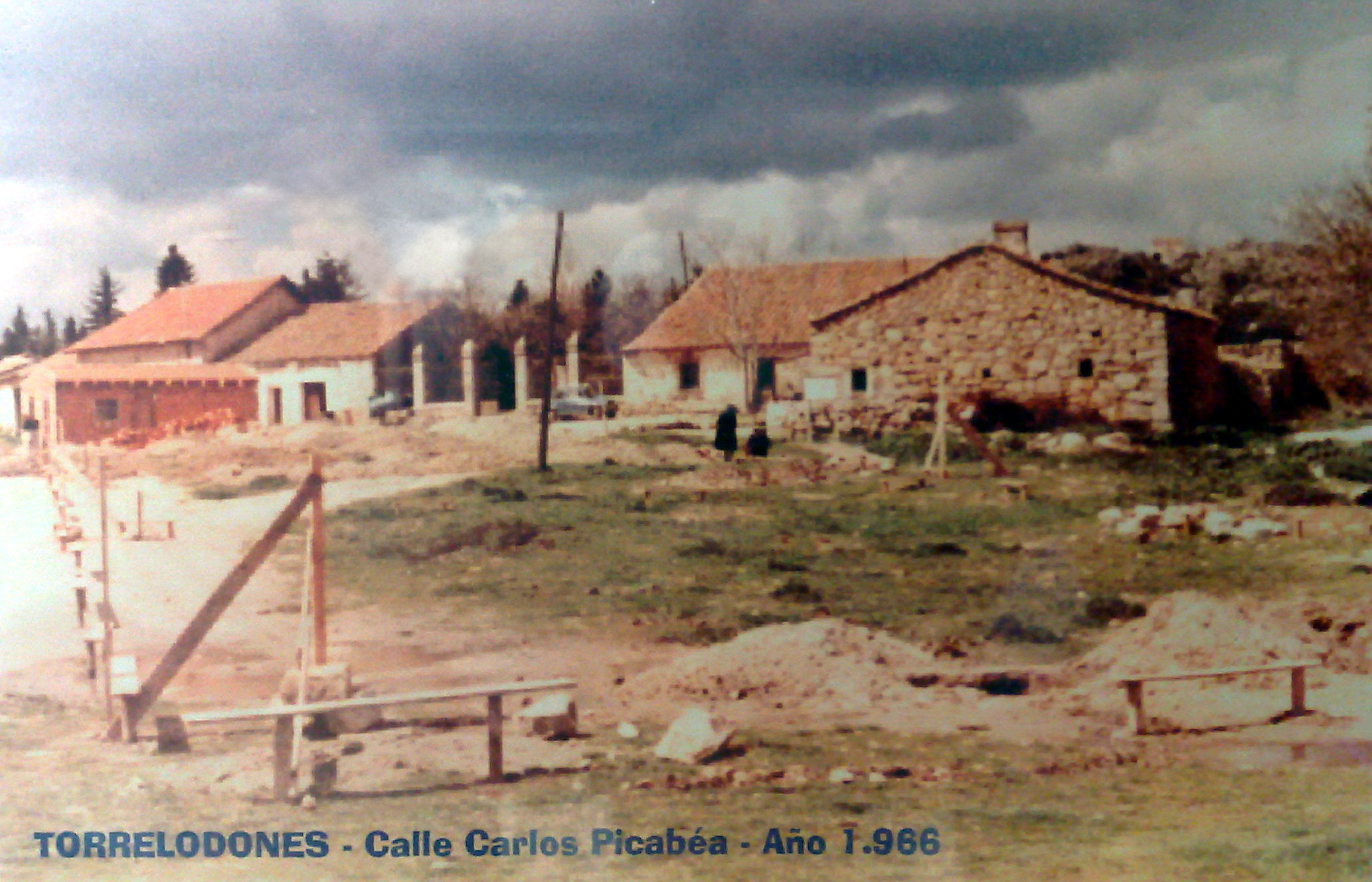 Torrelodones. Calle Carlos Picabea en el año 1966.